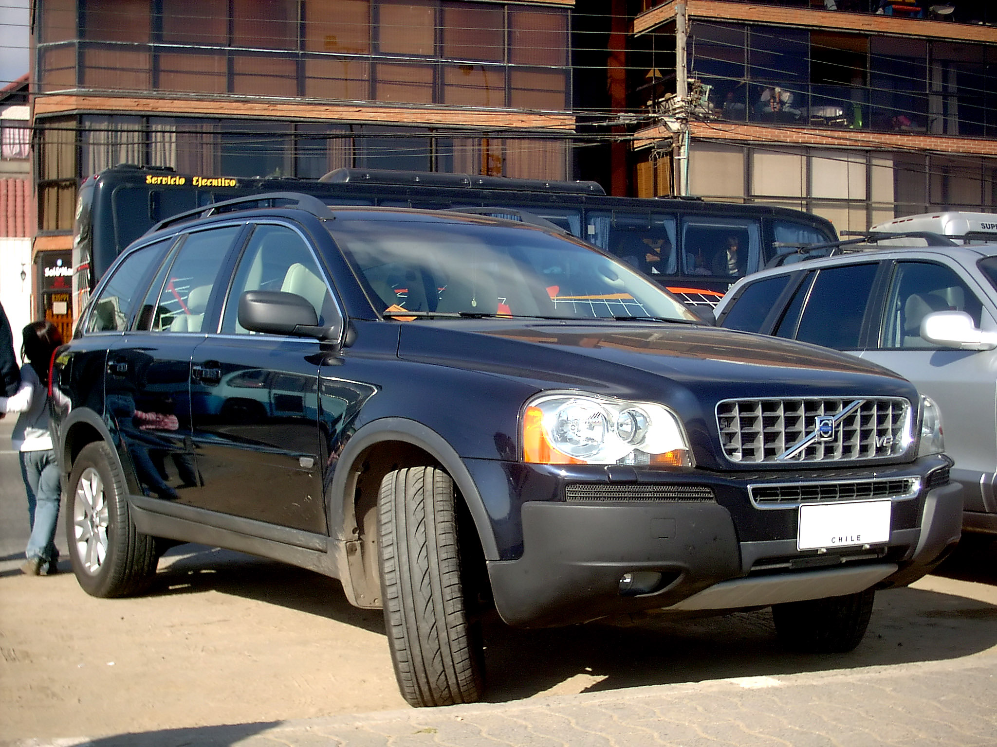 Volvo XC 90 V8 2007